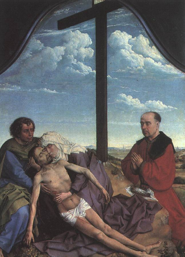 La obra representa a Jesucristo muerto y en los brazos de su madre, la Virgen María.